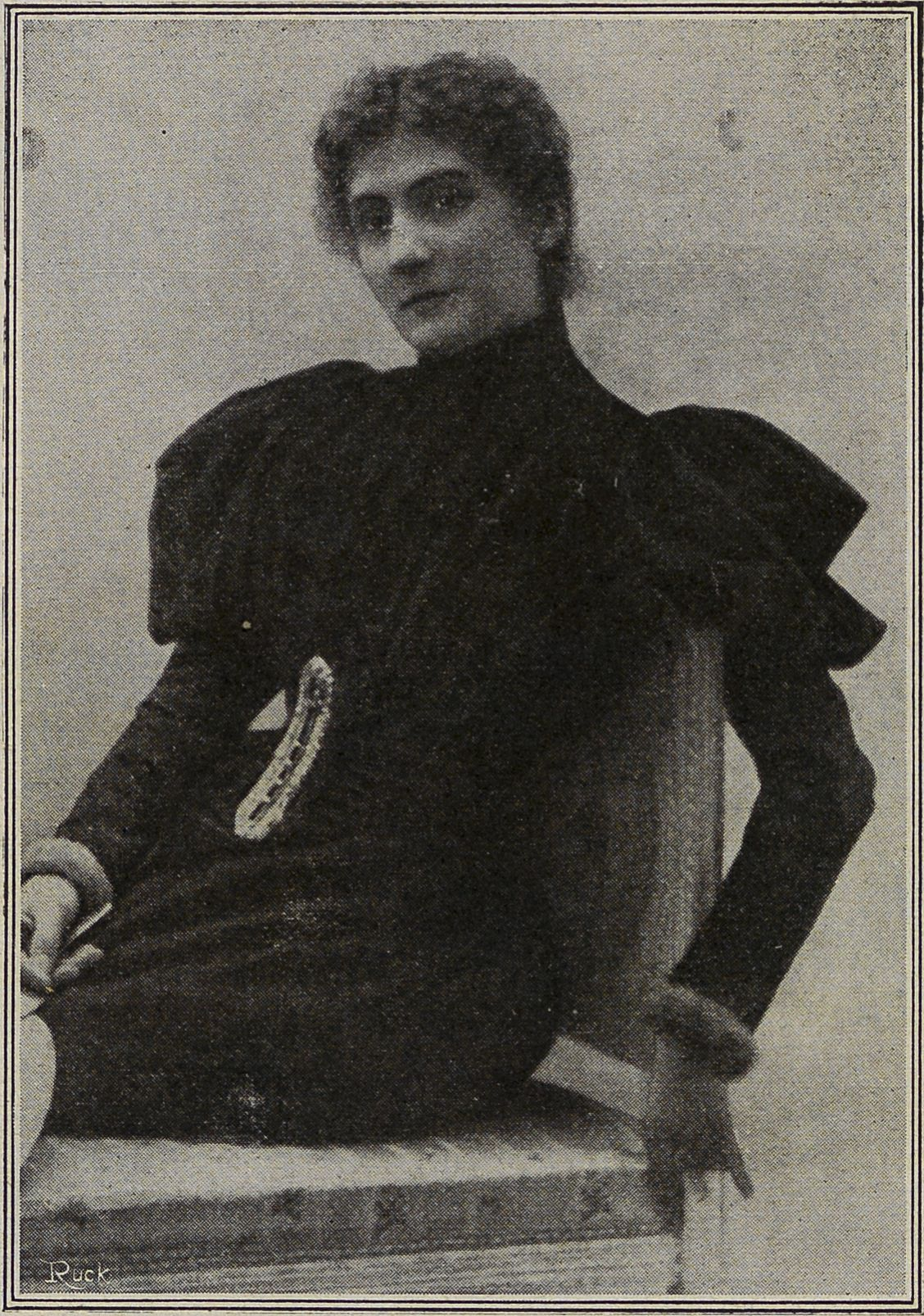 photographie de Gabrielle Ferrari parue dans la revue Musica n° 113 de février 1912